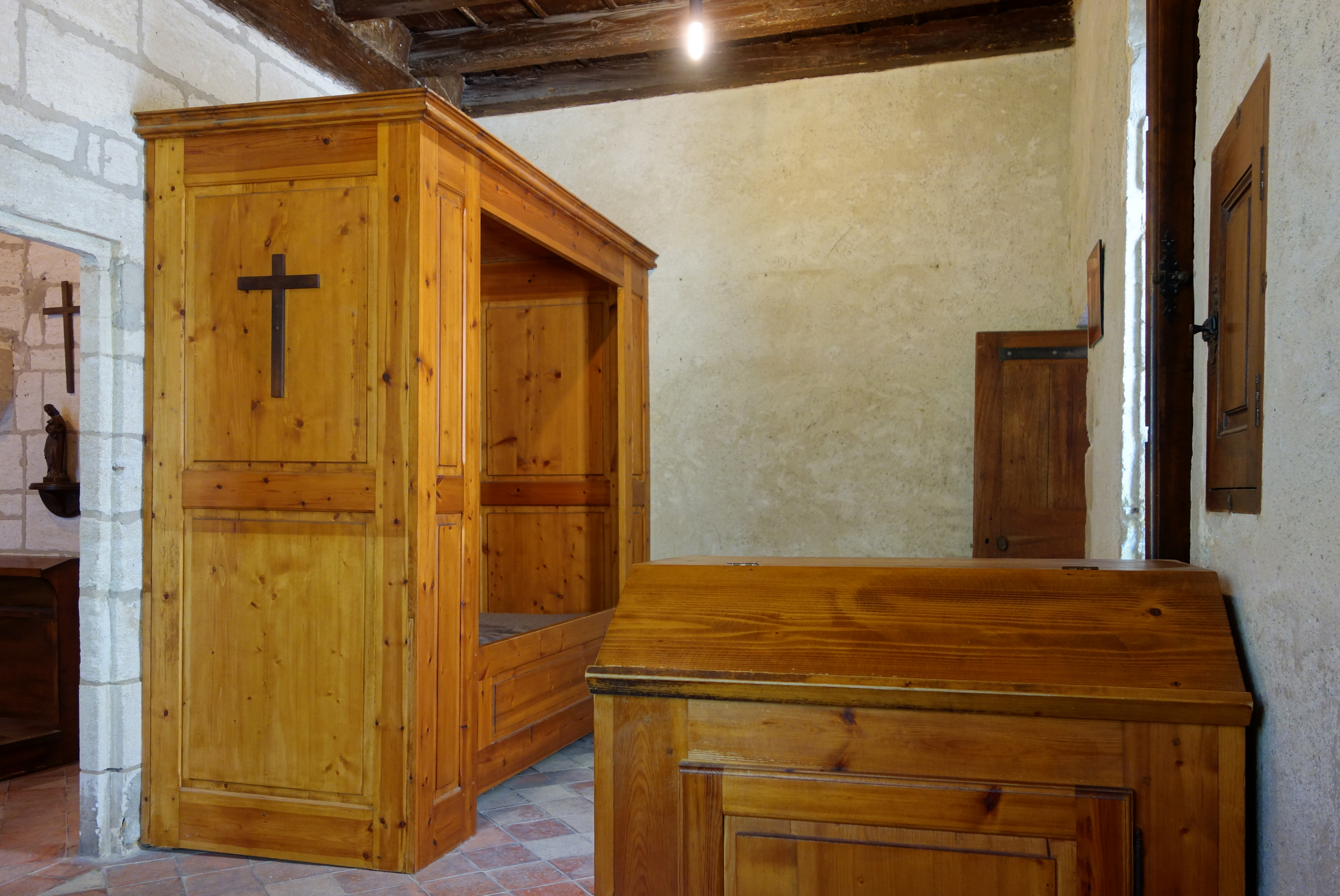 Cellule dans la Chartreuse du Val de Bénédiction à Villeneuve-lès-Avignon.